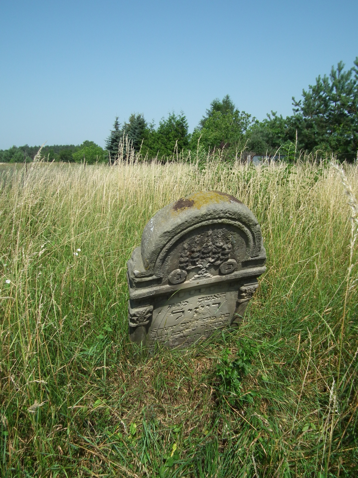 Annopol - Cmentarz żydowski (zabytek nr 408/A z 19.10.1989)